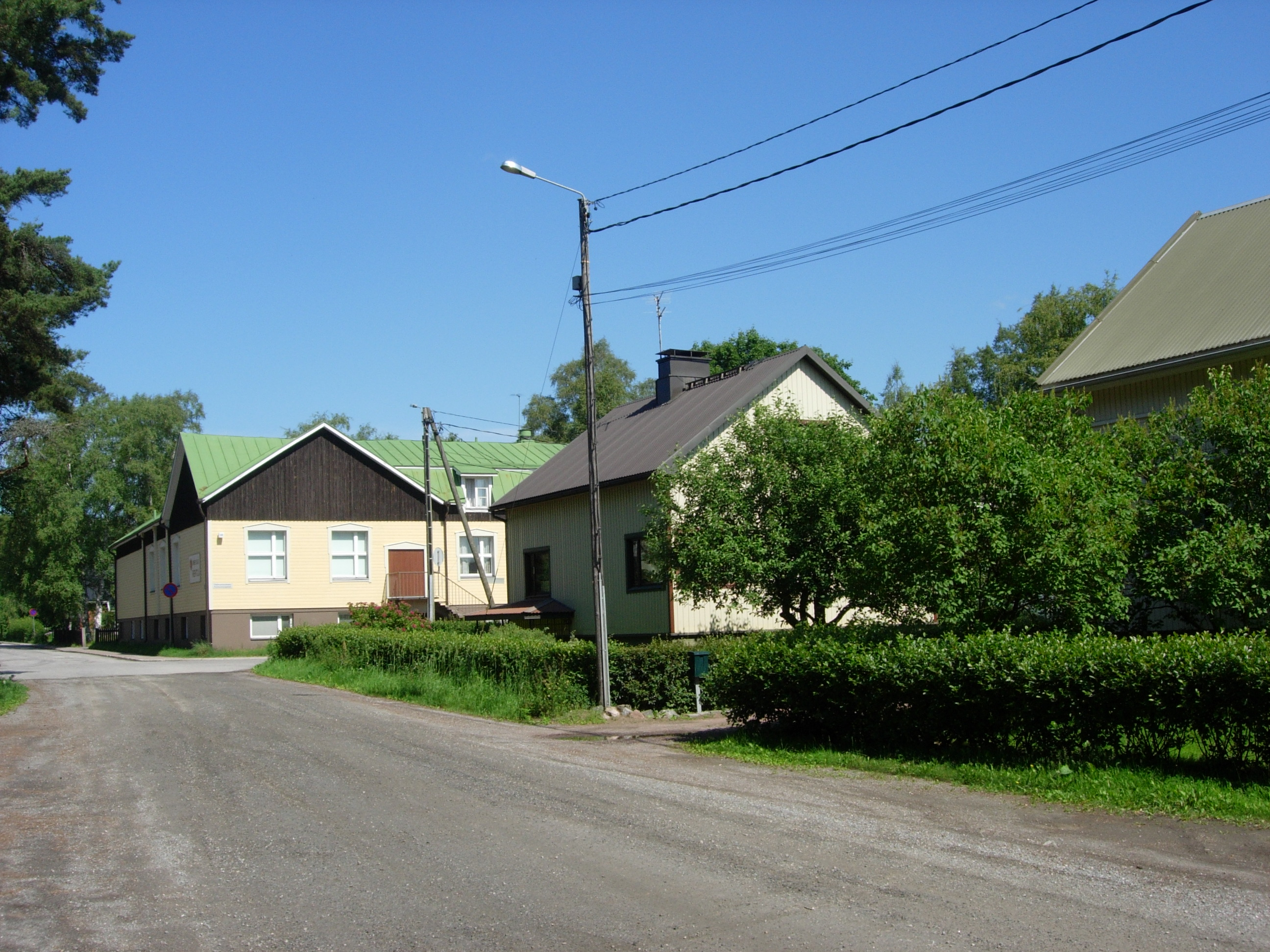 Pulmussuonkatu (edessä poikittain) ja Valkiasvuorenkatu (näkymän suuntainen) risteys. Risteyksessä Rientolan urheilutalo. Kärsämäki, Turku.